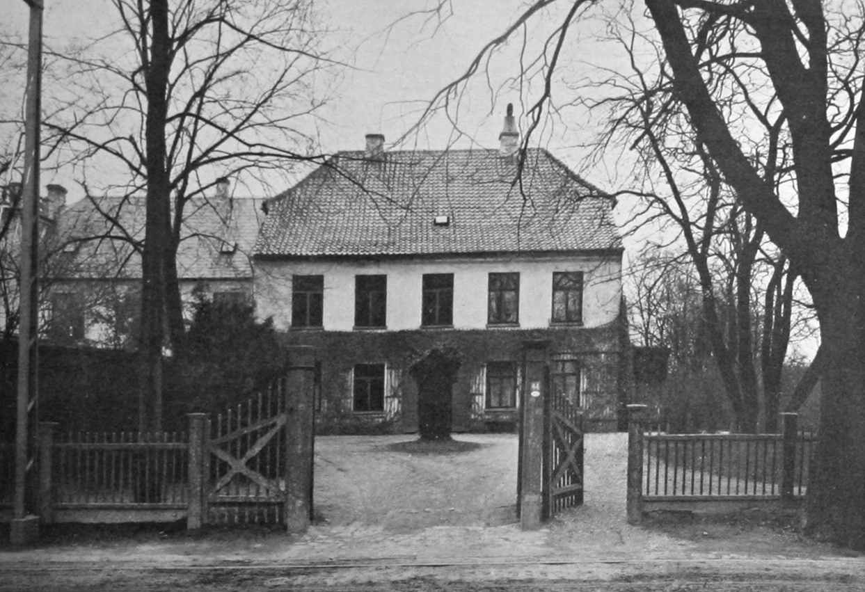 Gammel Vartov in Hellerup, north of Copenhagen, Denmark